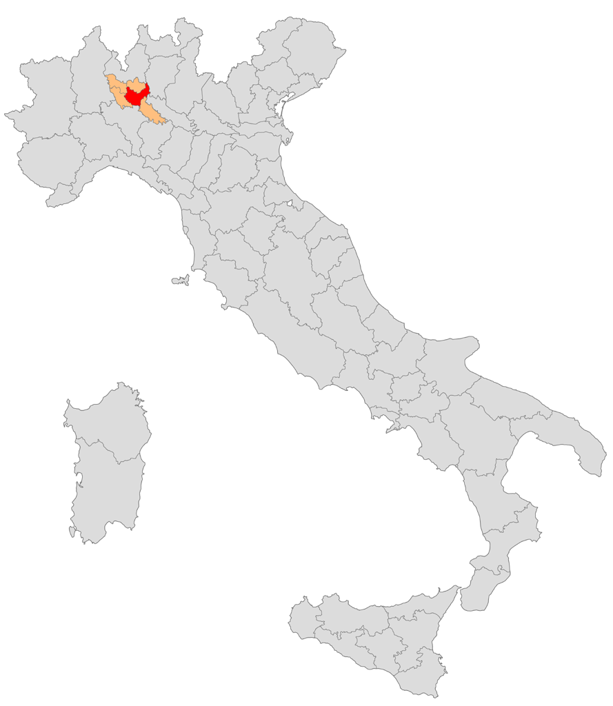 Mappa del circondario di Milano nella provincia di Milano (1859-1927)